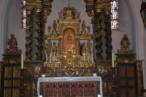 Détail du premier Retable -vue de face